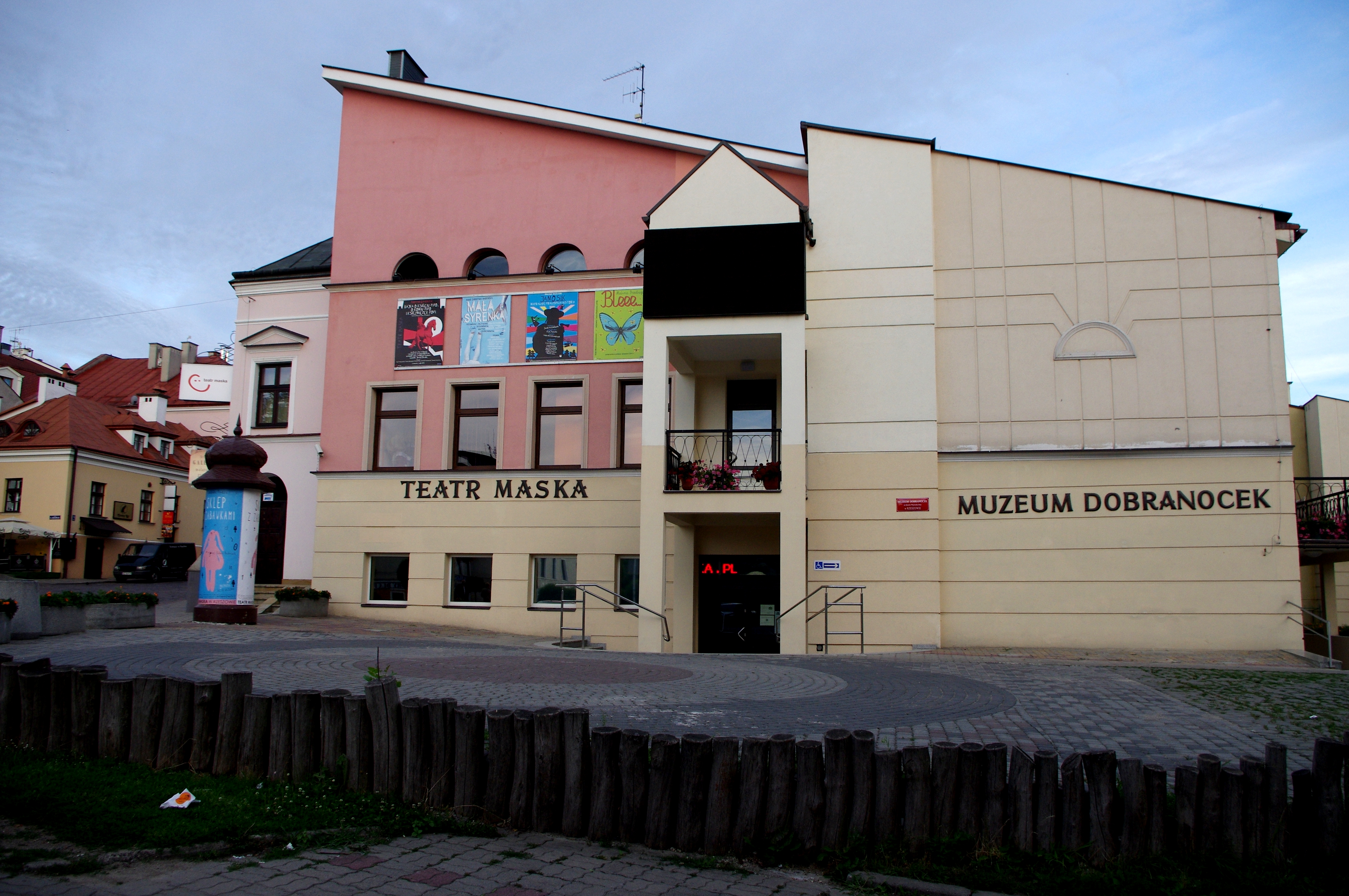 Teatr Maska i Muzeum Dobranocek w Rzeszowie